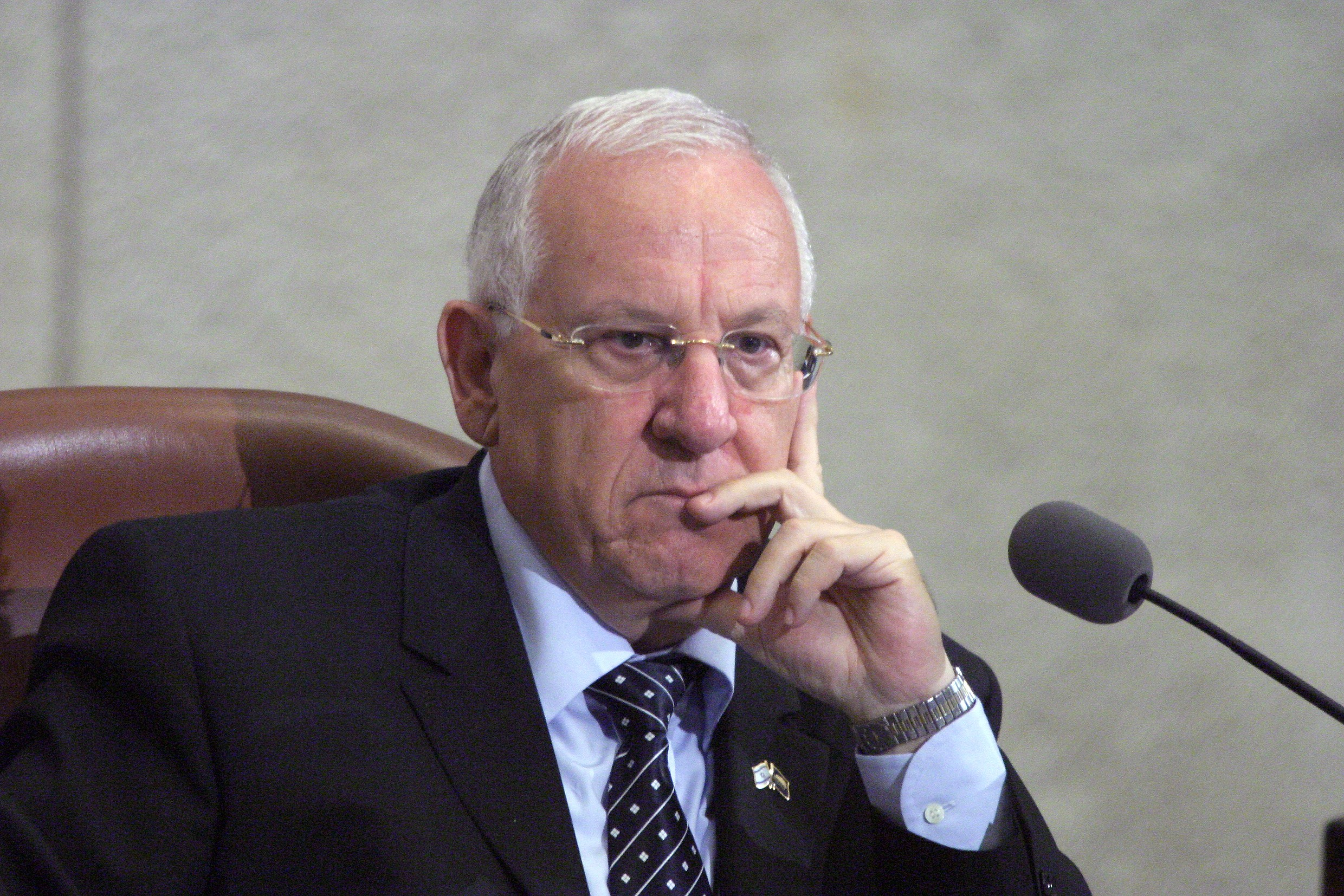 he:חבר הכנסת he:ראובן ריבלין על כס he:יושב ראש הכנסת